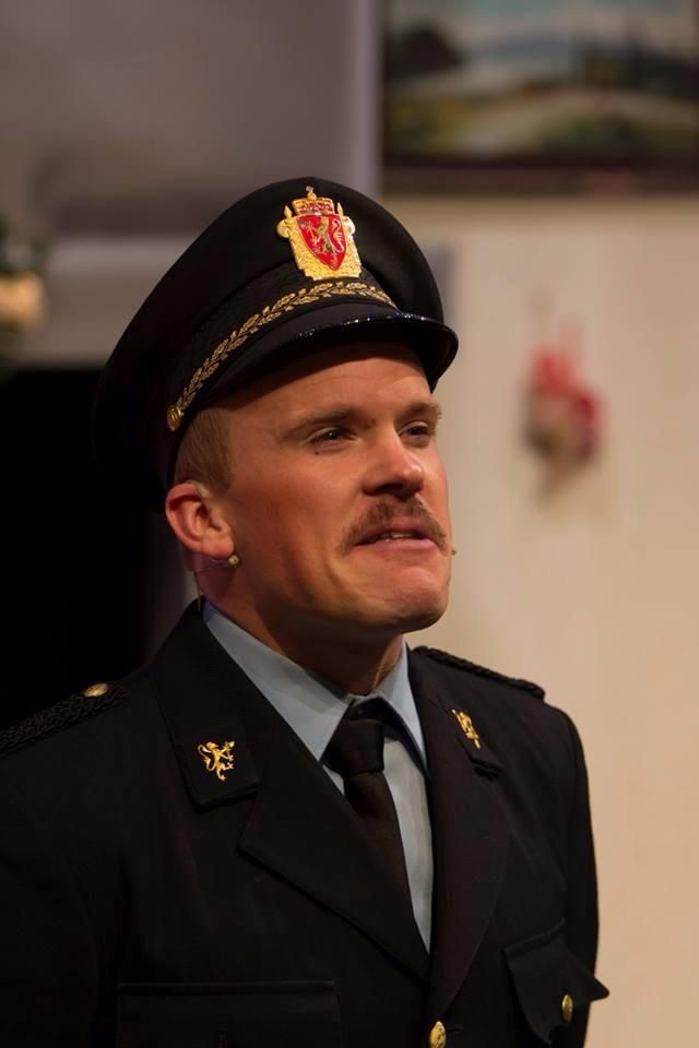 "Jakten på Juleskurken"